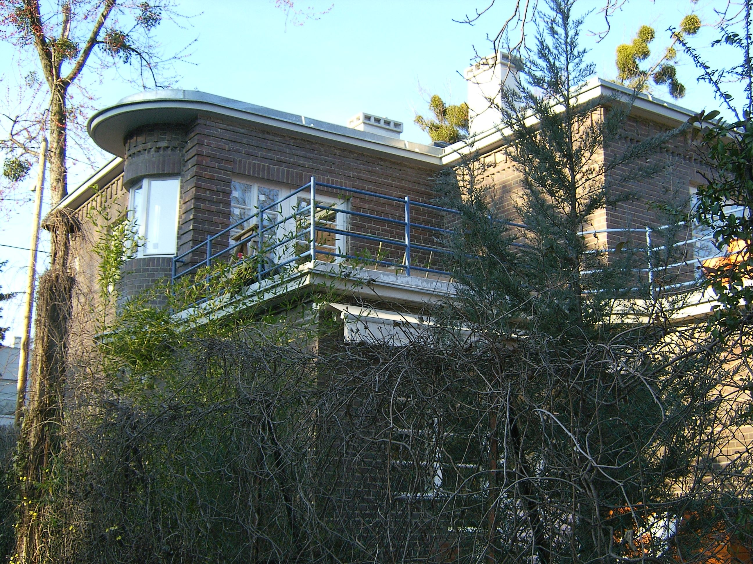 Napraforgó utcai villa 9-es szám (Pasarét, Budapest II.)